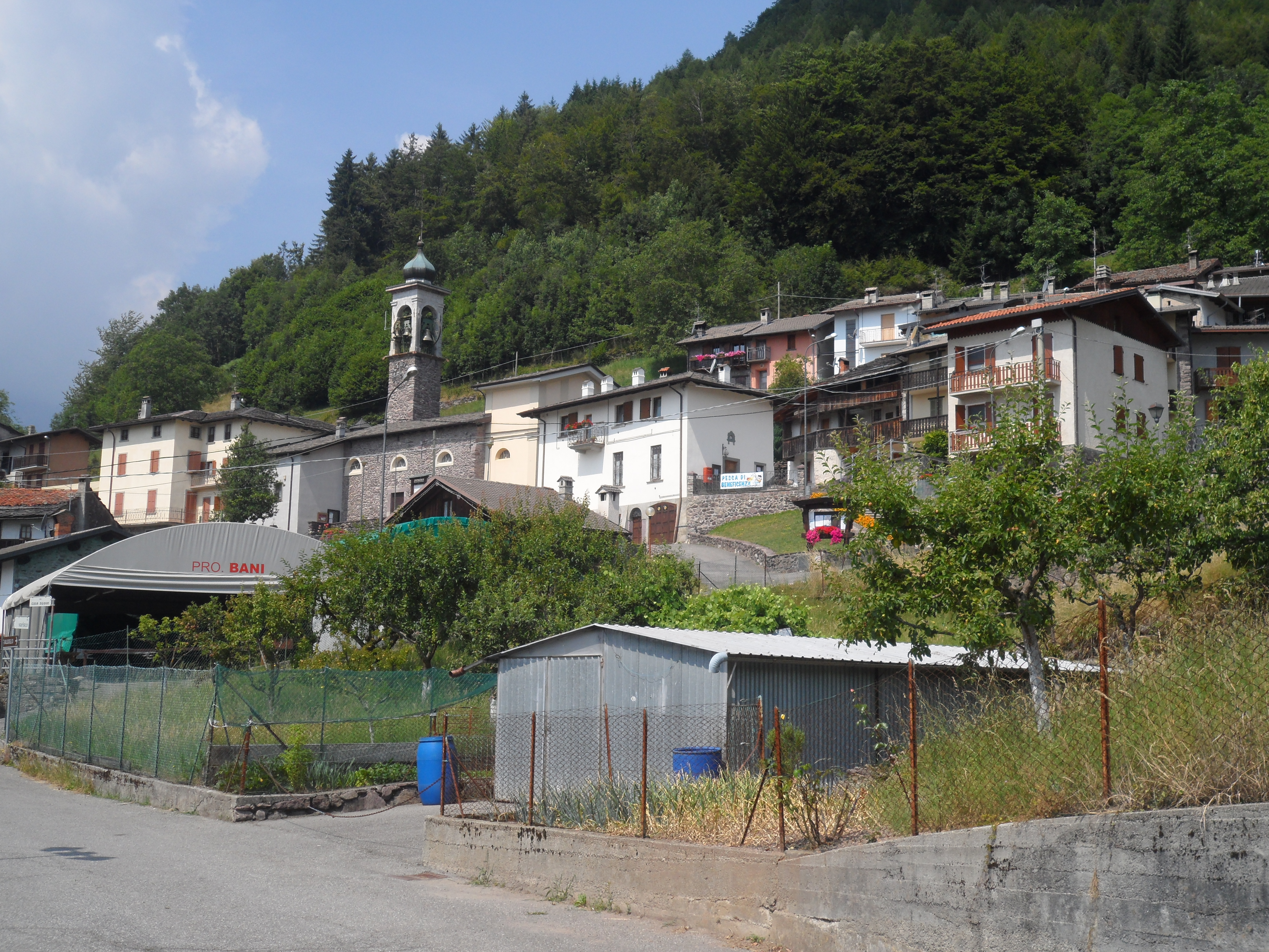 Panorama dei Bani (Ardesio) in provincia di Bergamo